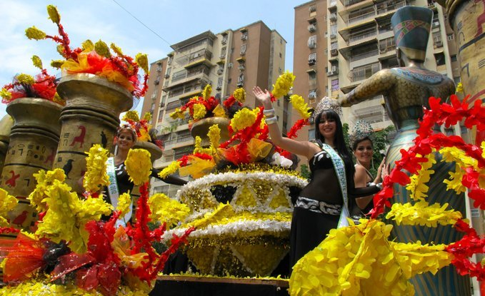 Feria san jose carroza maracay